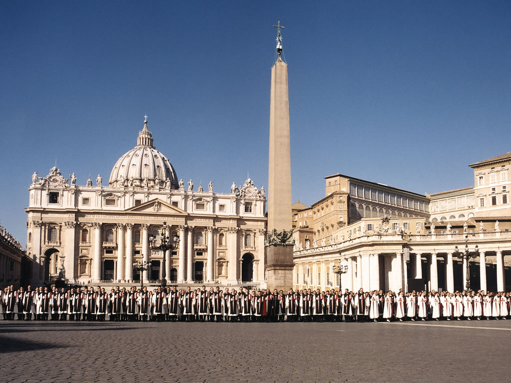 Gli Araldi del Vangelo in Piazza San Pietro in occasione dell'approvazione pontificia (febbraio 2001)